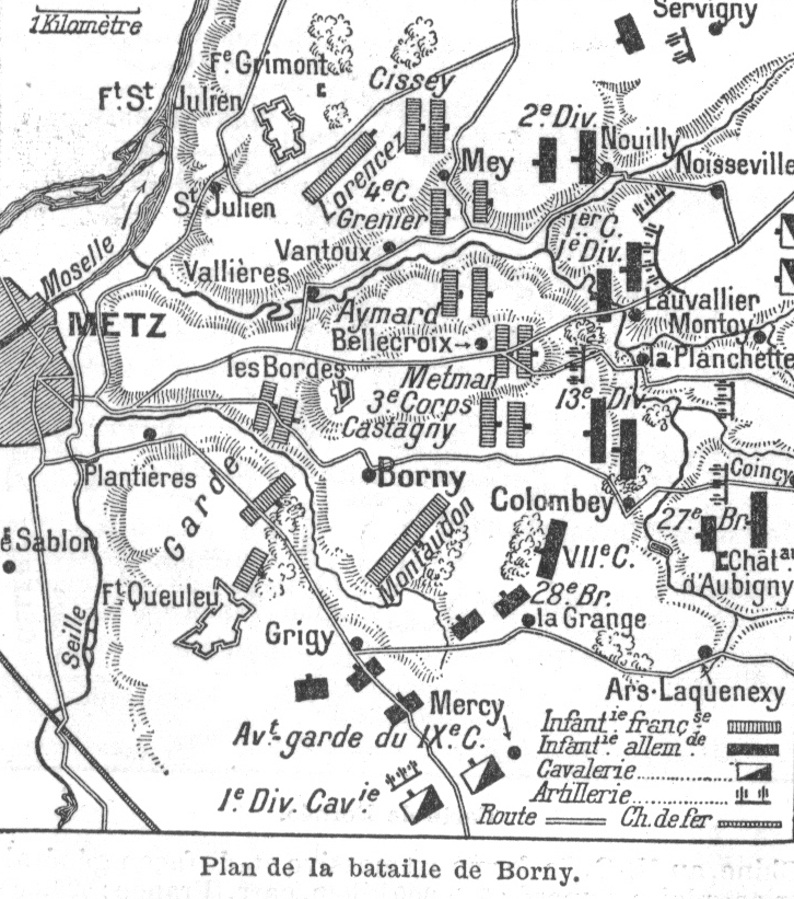 Bataille de Borny-Colombey le 14 août 1870 Source Nouveau Larousse Illustrée; Dictionnaire Universel encyclopédique, publié sous la direction de Claude Augé, deuxieme tome (de Belloc à Ch), édition année 1904.